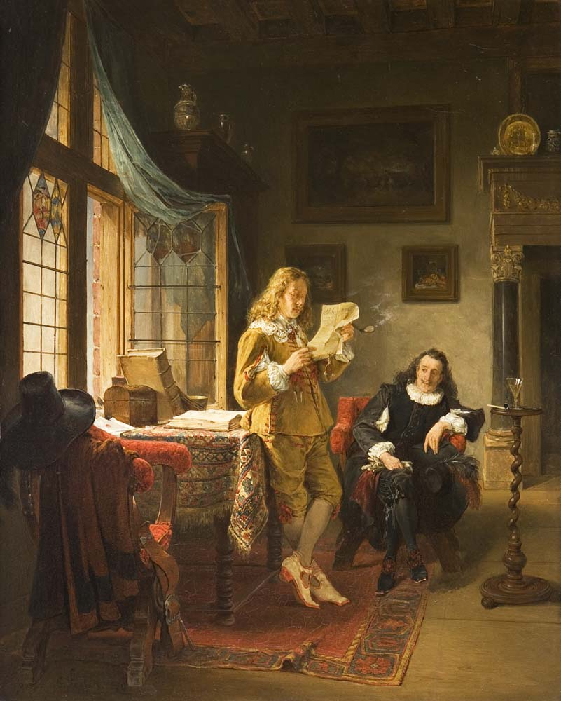 "Die Vorlesung", Öl auf Holz, signiert, datiert: 1879, rückseitig alte Londoner und Münchner Klebezettel, 38 x 30 cm